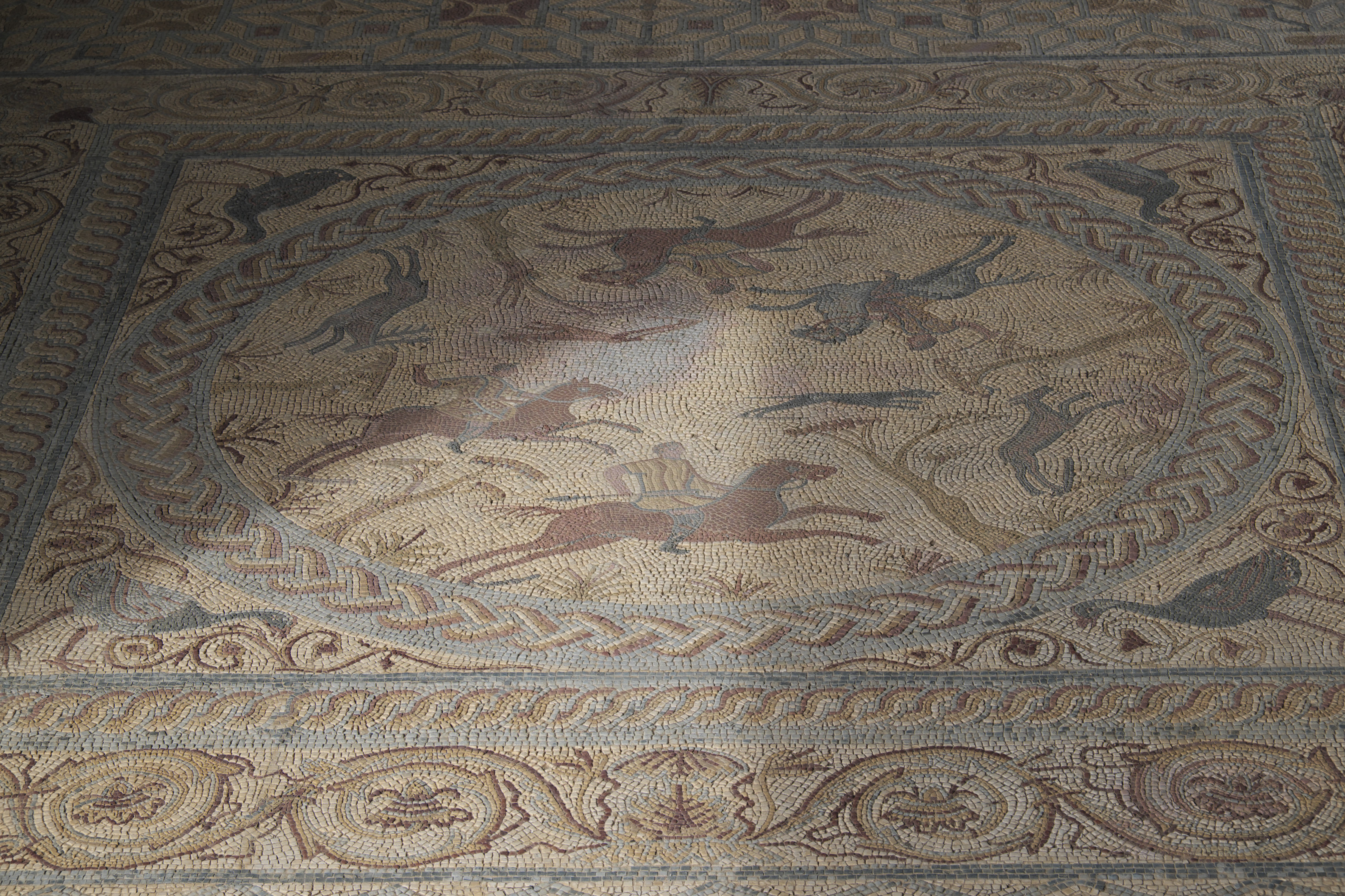 Ausgrabungsstätte Conimbriga in Condeixa-a-Nova im Distrikt Coimbra (Portugal), Mosaik